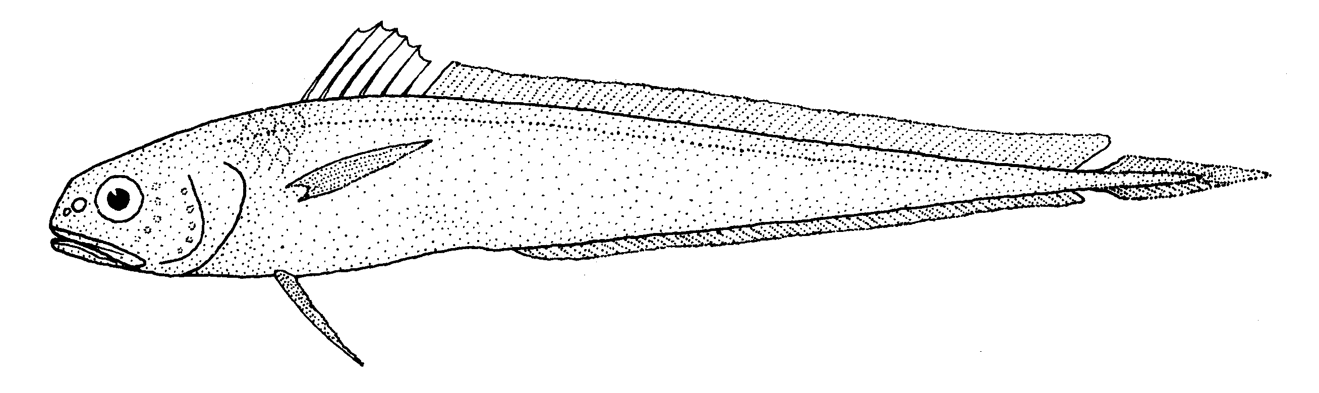 Melanonus gracilis (Pelagic cod)